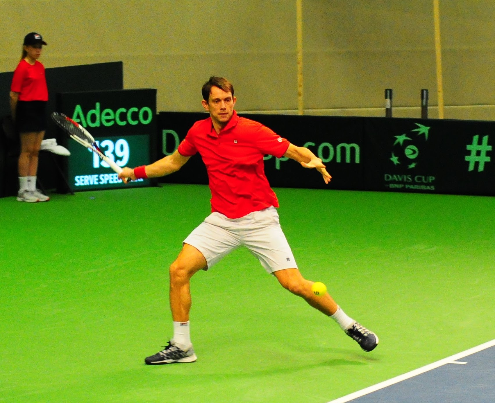 Frederik Nielsen slår en forehand i kampen mot Viktor Durasovic. Davis Cup Norge-Danmark 2017.